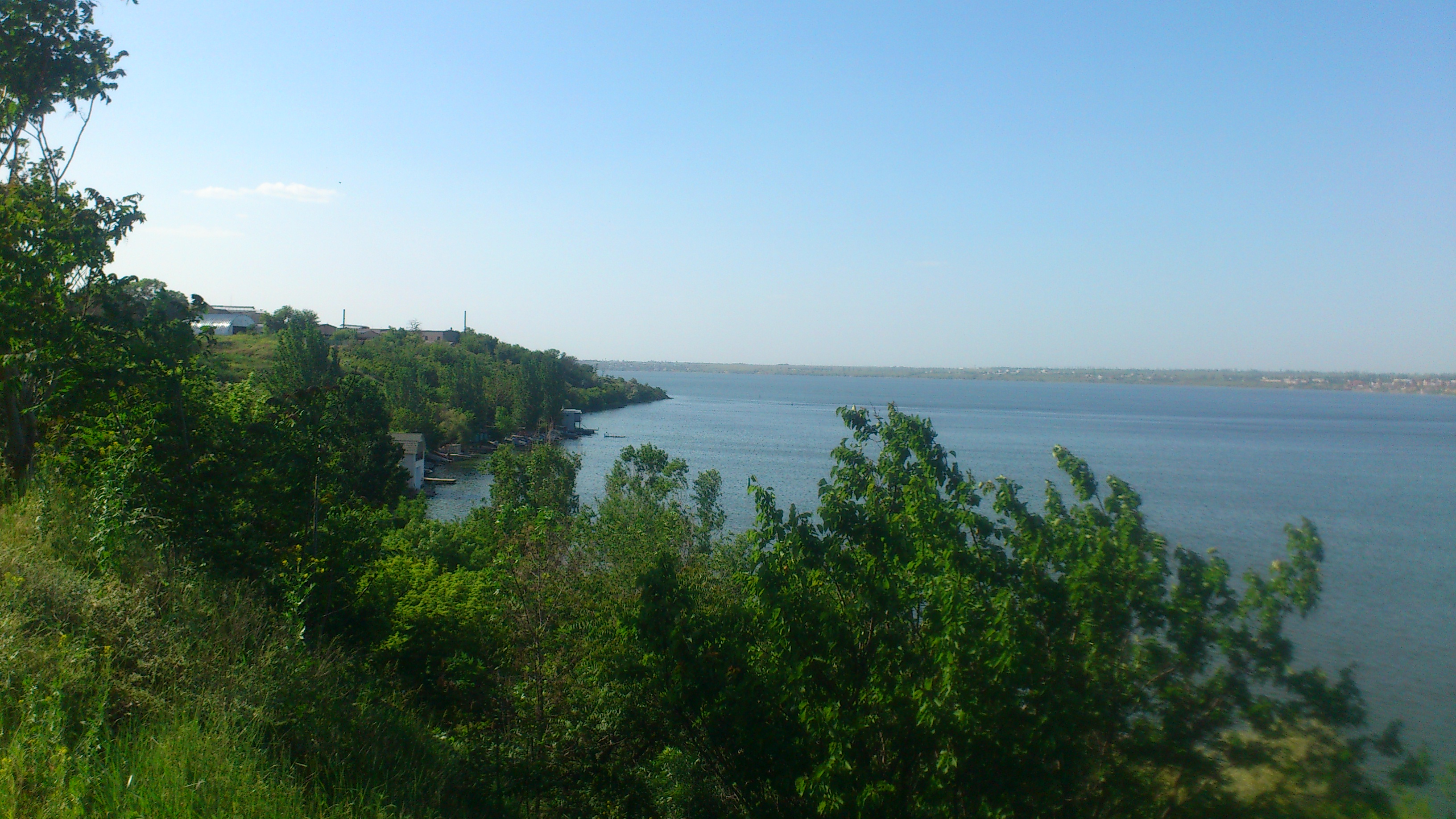 Миколаїв. Вид на Дикий Сад